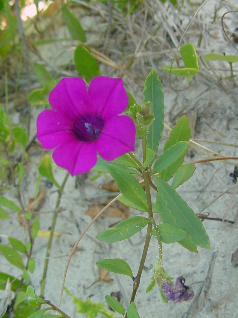 Petunia littoralis - SOLANACEAE - Praia do Mo�ambique - Florian�polis - SC - Brasil